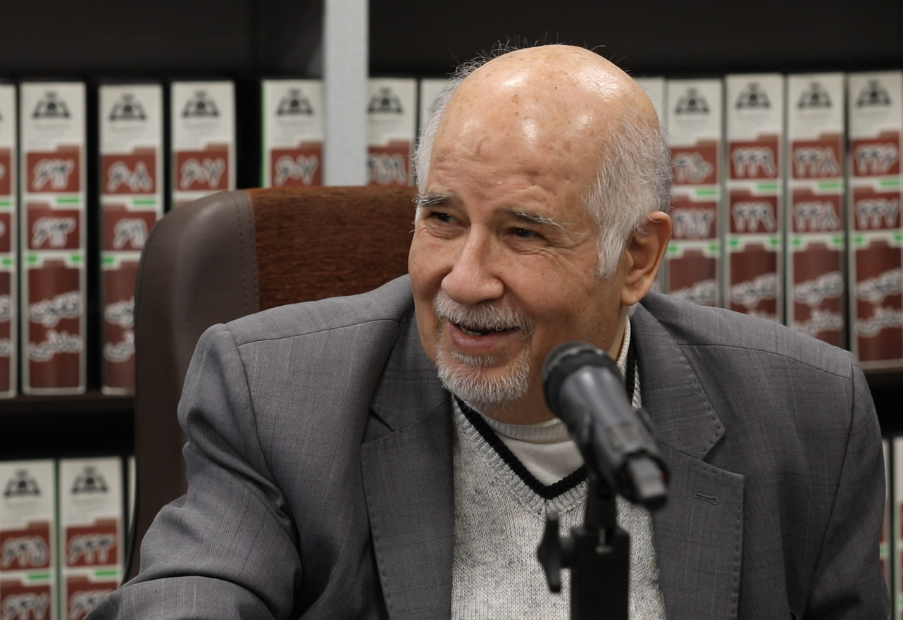 دکتر سید محمد هاشمی در مرکز پژوهشی دانشنامه های حقوقی علامه